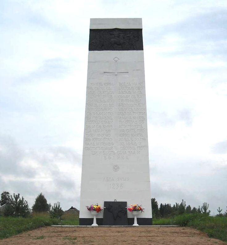 стела на берегу реки Сить в память о битве 1238 года